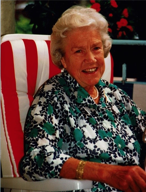 Prof. Dr. Brigitte Sarry Professorin für Anorganische Chemie an der Technischen Universität Berlin